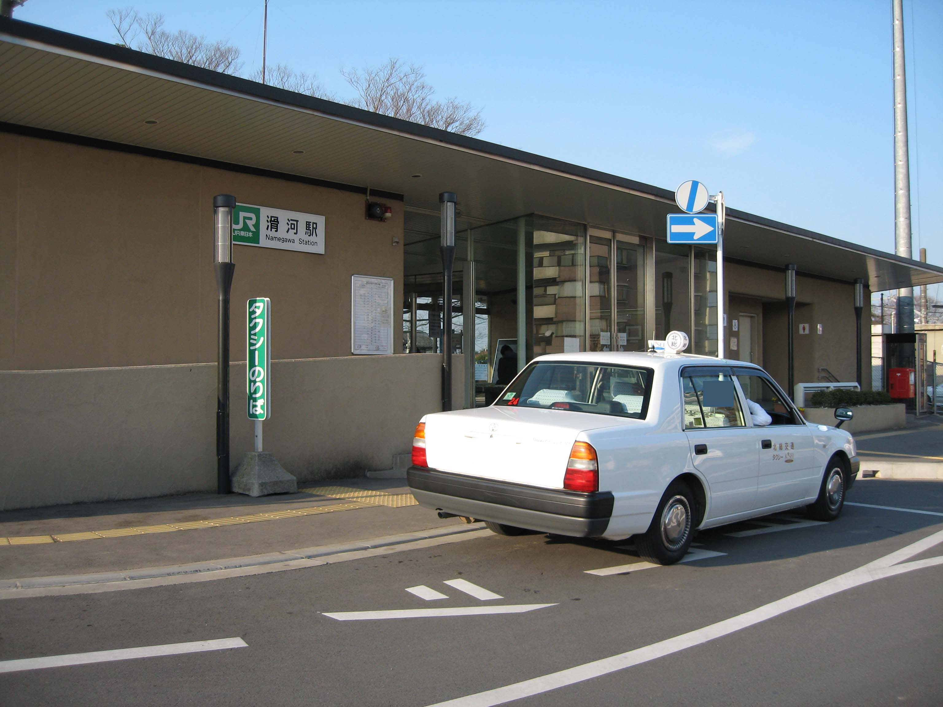 Namegawa Station, Narita Line, Chiba, Japan, 滑河駅駅舎